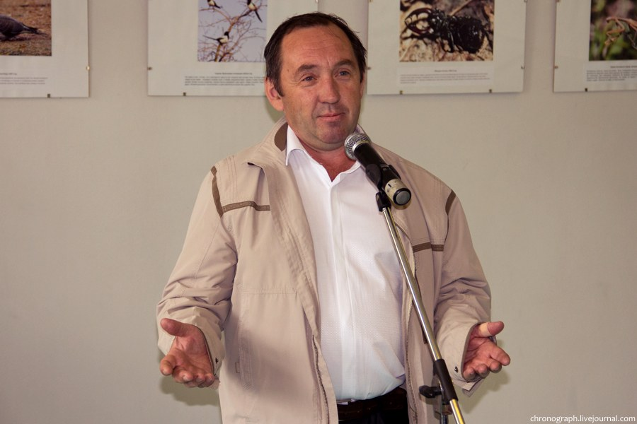 Директор Жигулевского заповедника Юрий Петрович Краснобаев, кандидат биологических наук.